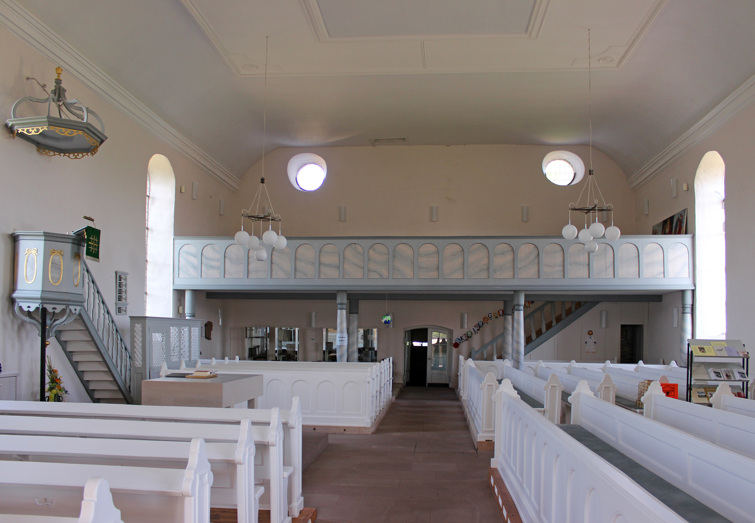 Innenraum der evangelischen Kirche in Wolfersweiler, Gemeinde Nohfelden, Landkreis St. Wendel, Saarland